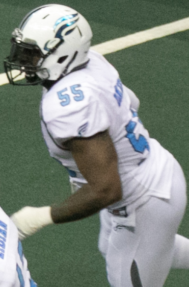 Valor 47 / Philadelphia Soul 48